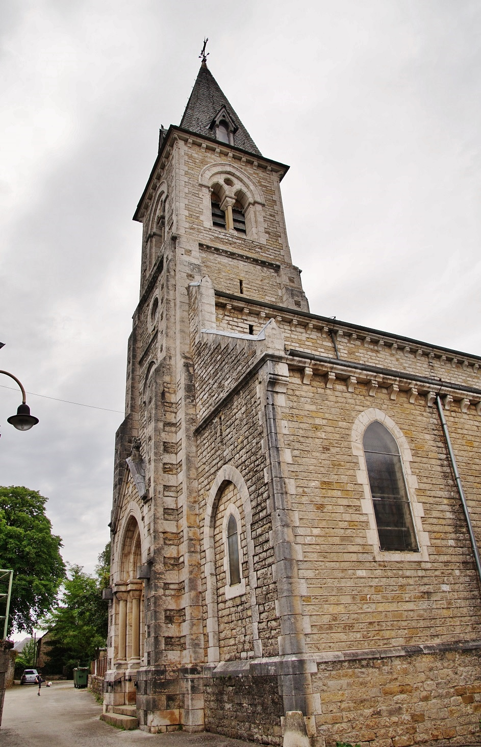 église